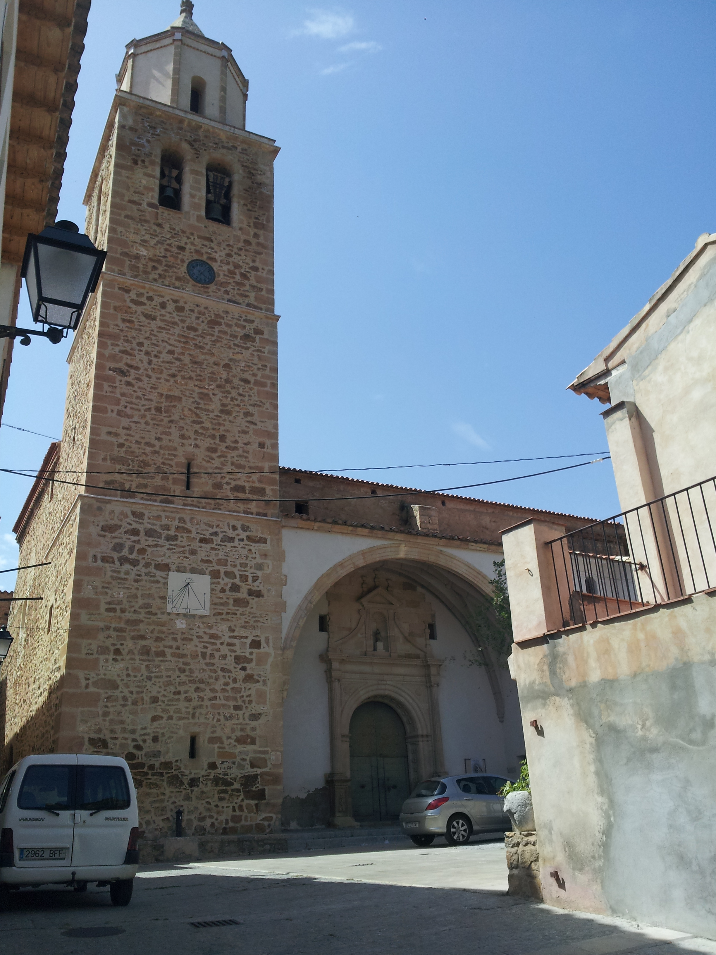 Cortes d'Arenós - Església